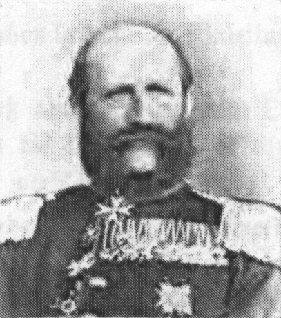 Adolf von Hertzberg Depicted person: Adolf von Hertzberg